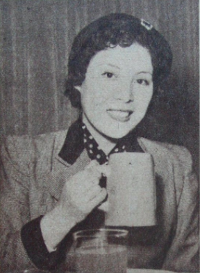 朝日麦酒『ほろにが通信』昭和29年3月号